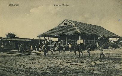 Bahnhof von Ouidah, Benin